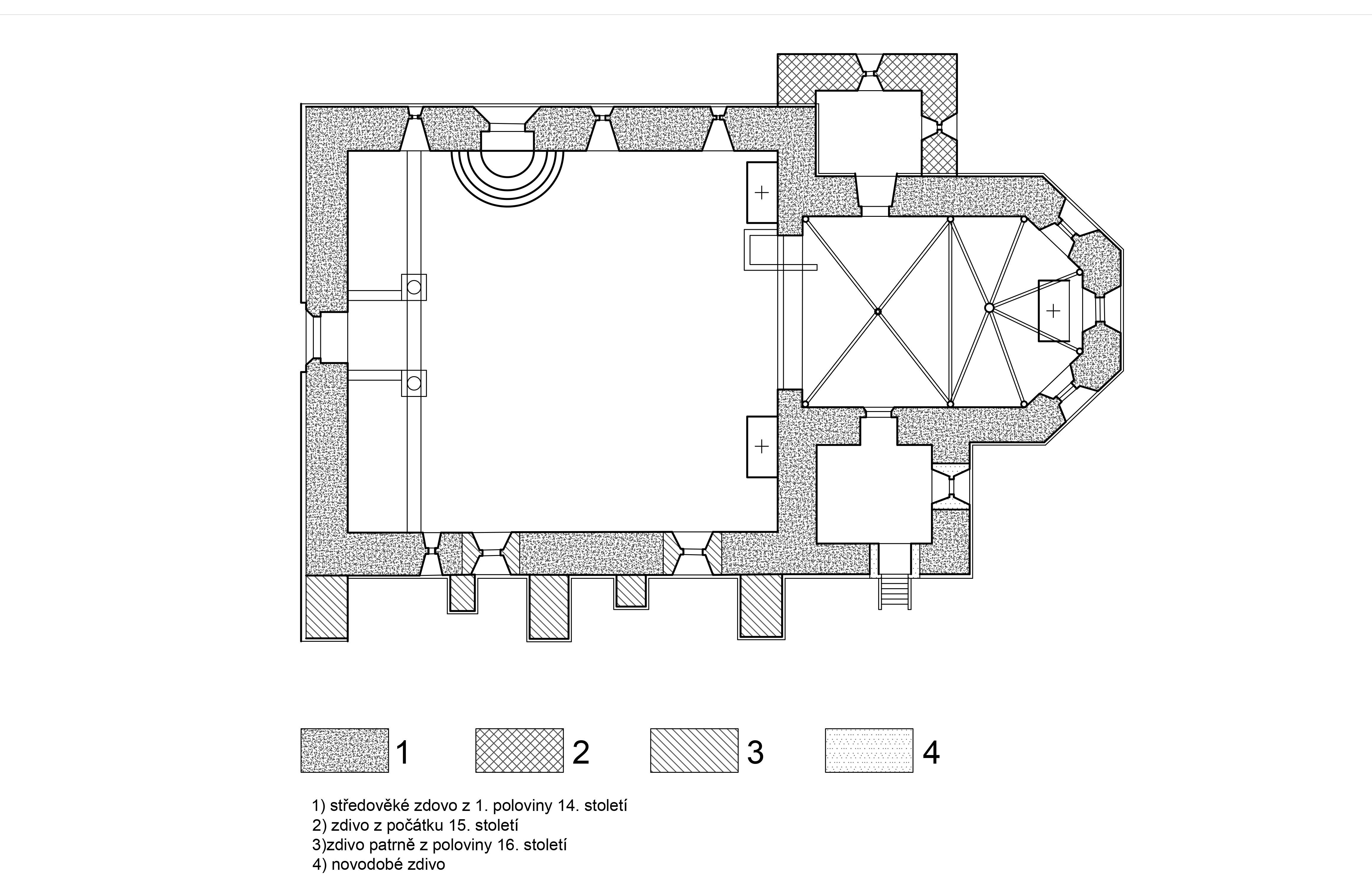 Domažlice, kostel U Svatých, půdorys kostela. Zpracováno podle: Zdeněk Procházka: Domažlické kostely a kostelíky : stavebně historické zhodnocení, Domažlice 2014, str. 66